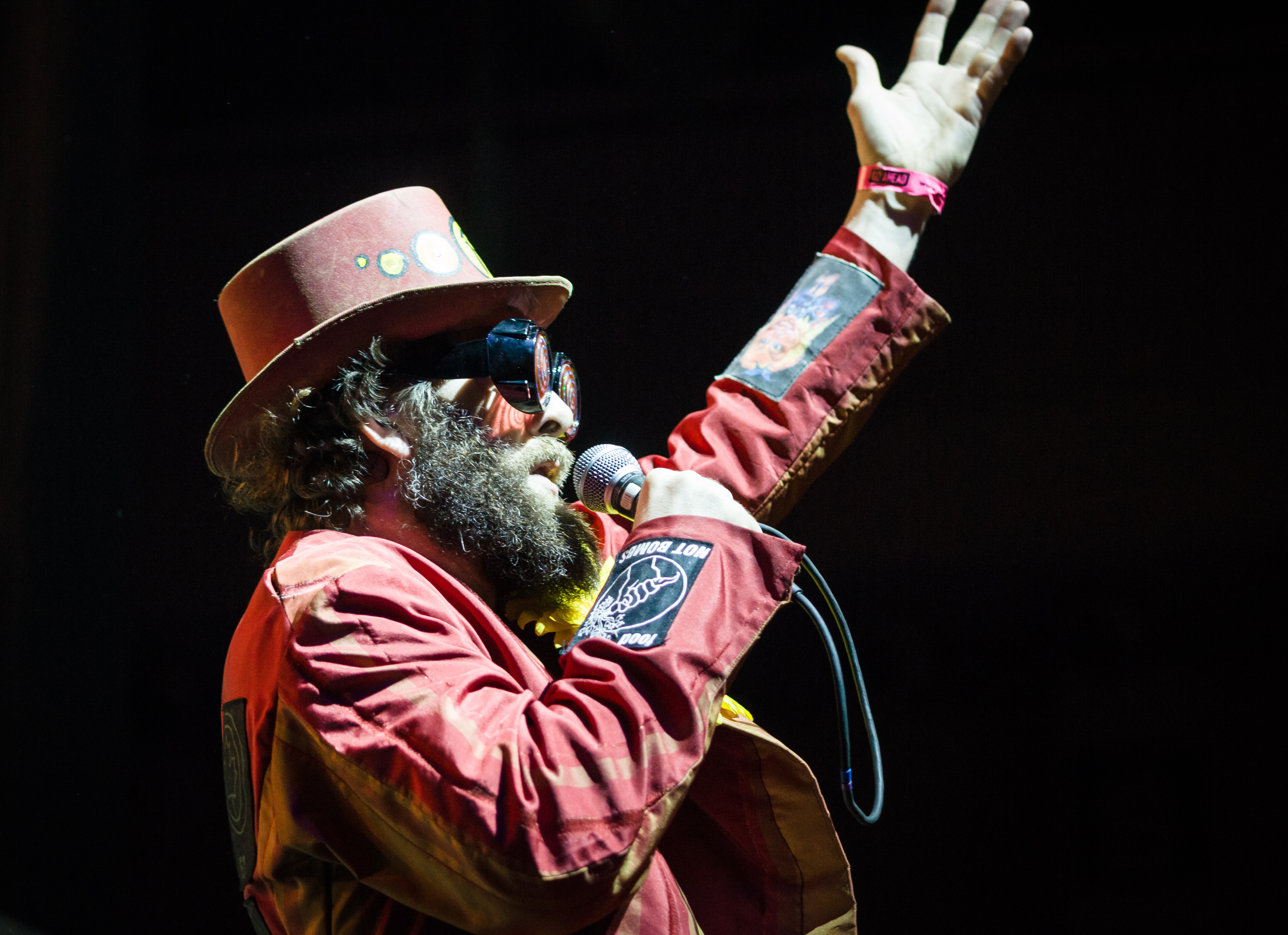 Włodzimierz Dembowski "Paprodziad", wokalista zespołu Łąki Łan podczas Rocket Festiwal 2013 w Warszawie.